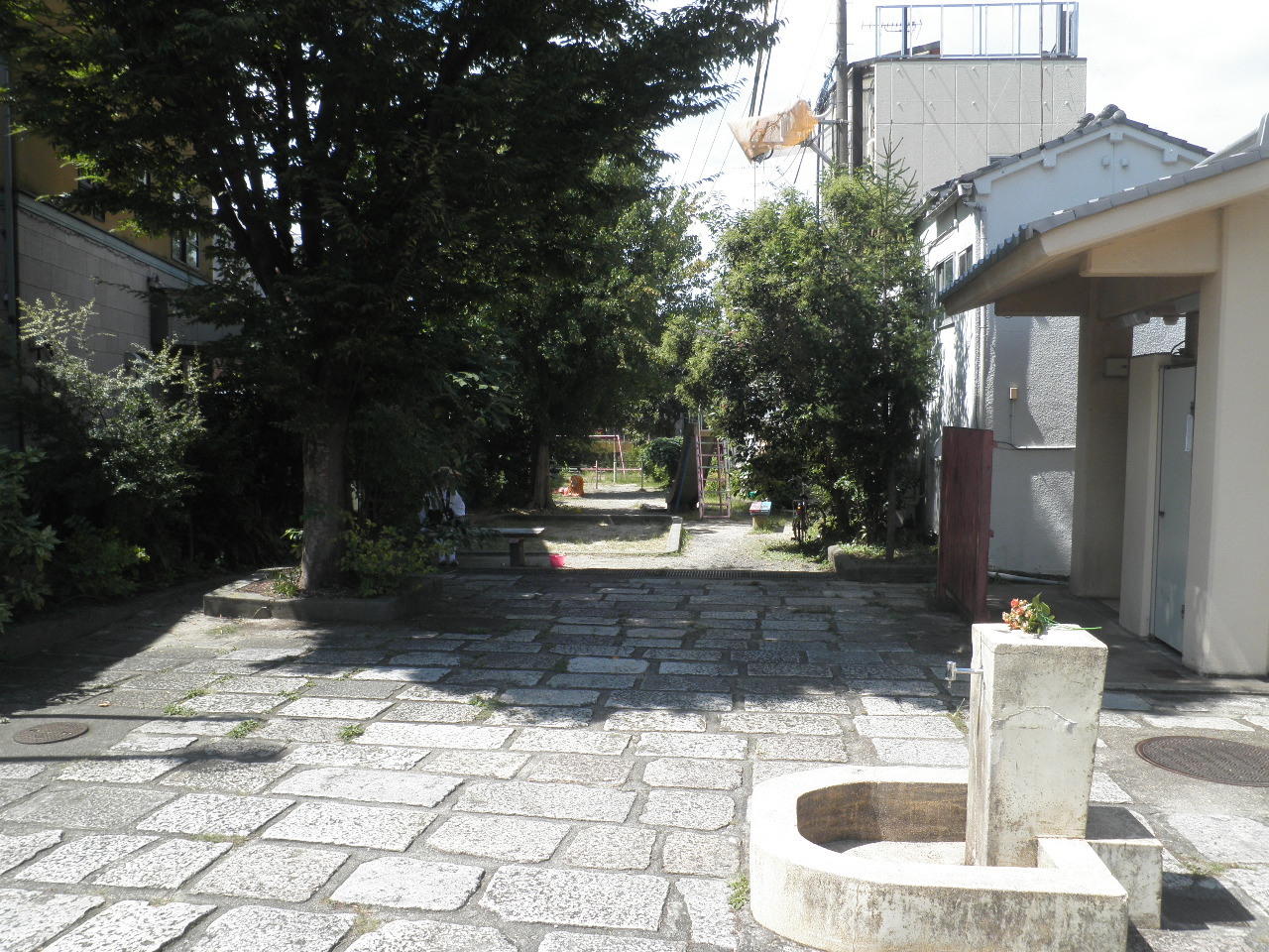 市電稲荷線の線路跡にある稲荷児童公園